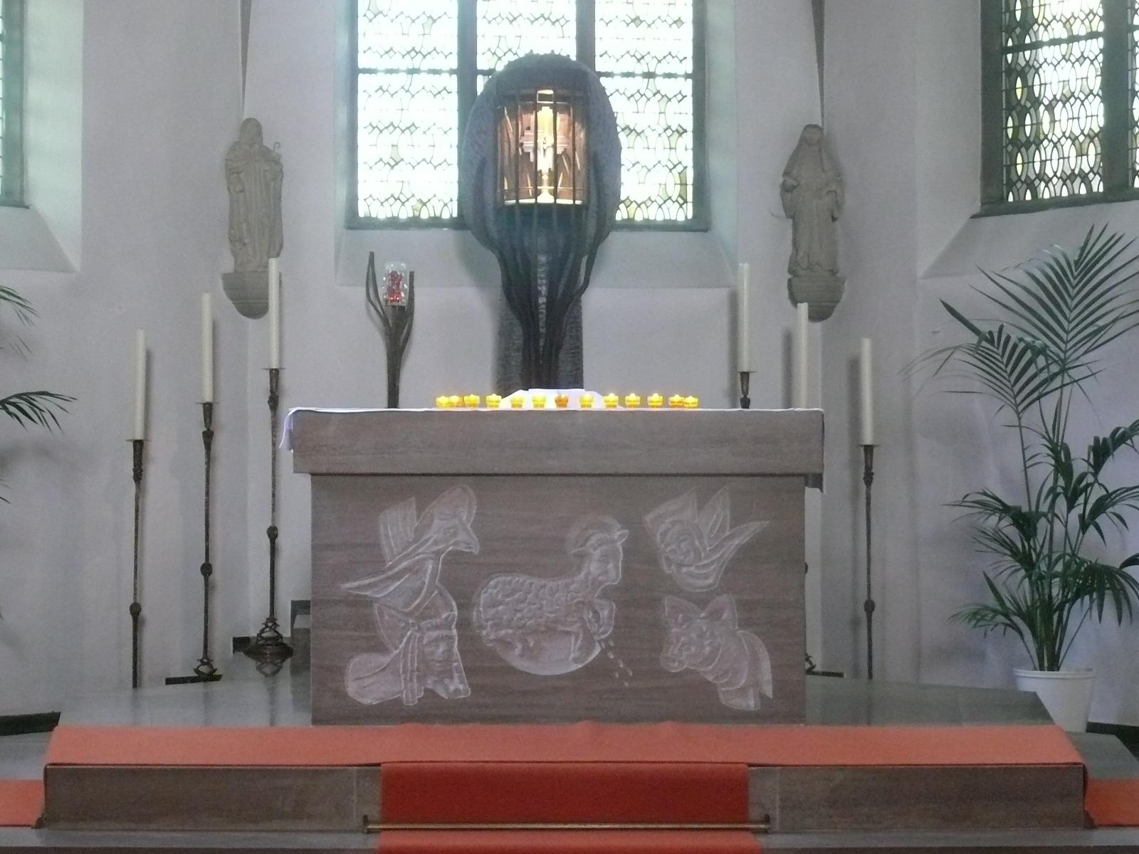 Altarraum der Vinnenberger Kirche.